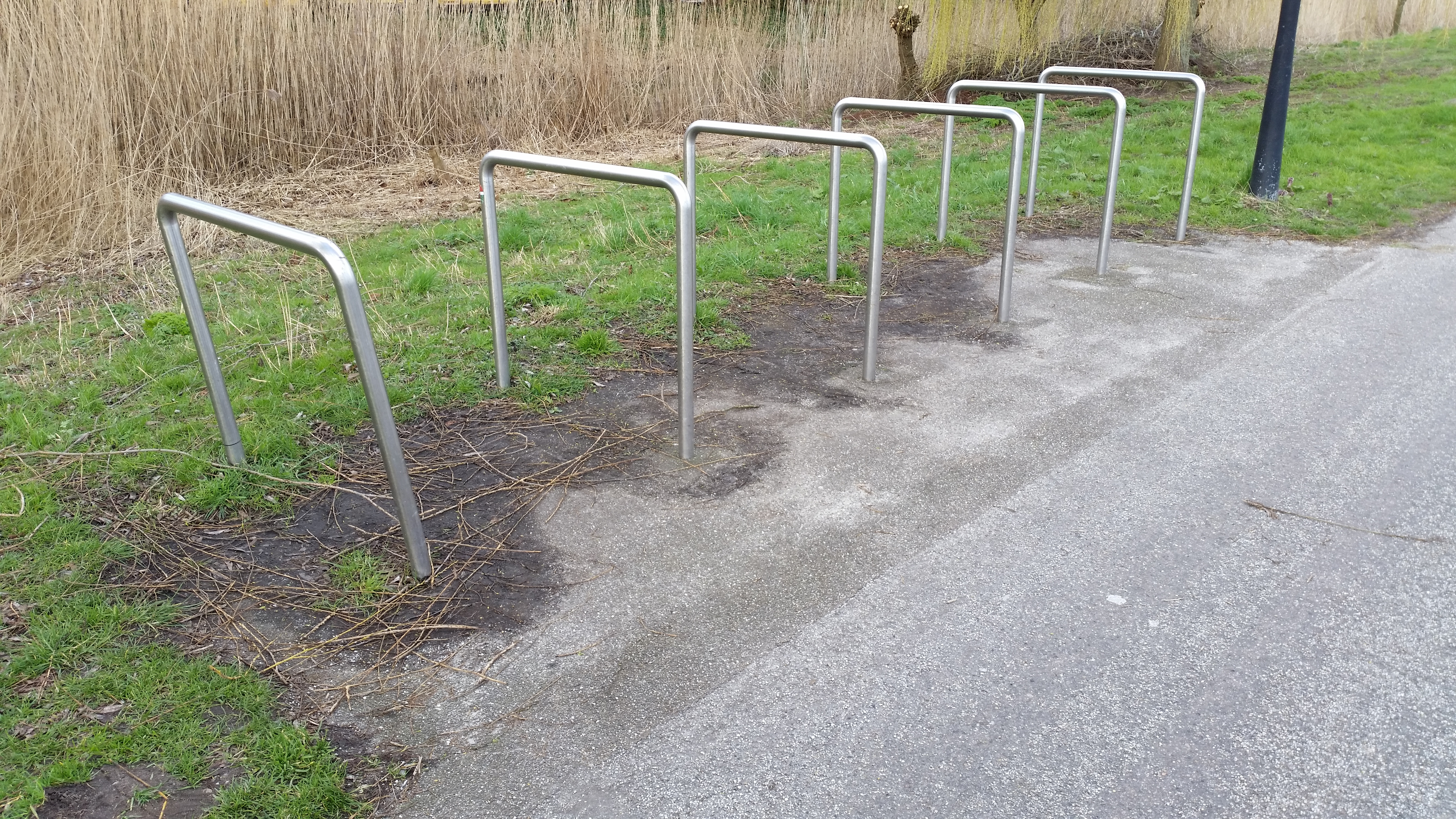 Fietsrekken ook wel nietjes genoemd in Park Frankendael, Watergraafsmeer